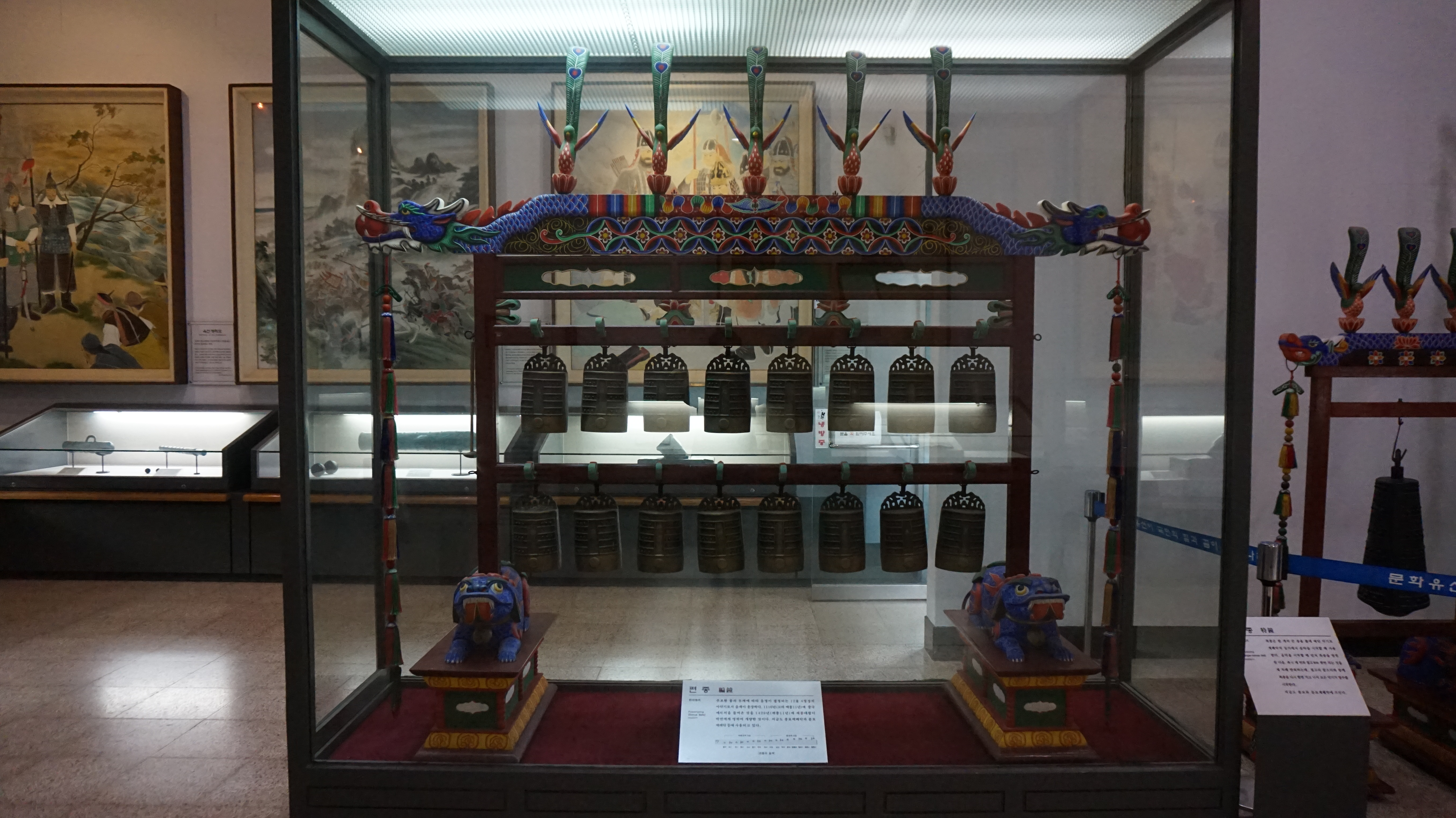 편종 (1)